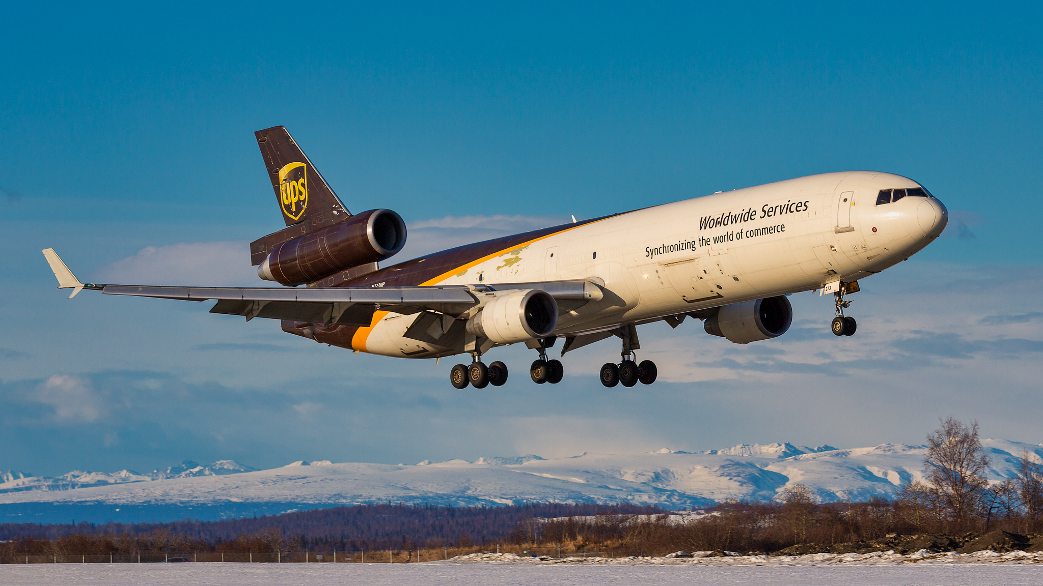 04062017_UPS_N273UP_MD11F_PANC_NASEDIT